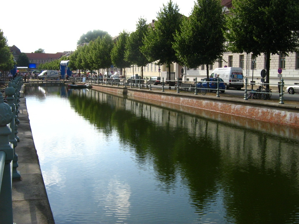 Der Potsdamer Stadtkanal am 08.Juli 2007 für Kanuveranstaltungen mit Wasser gefüllt.